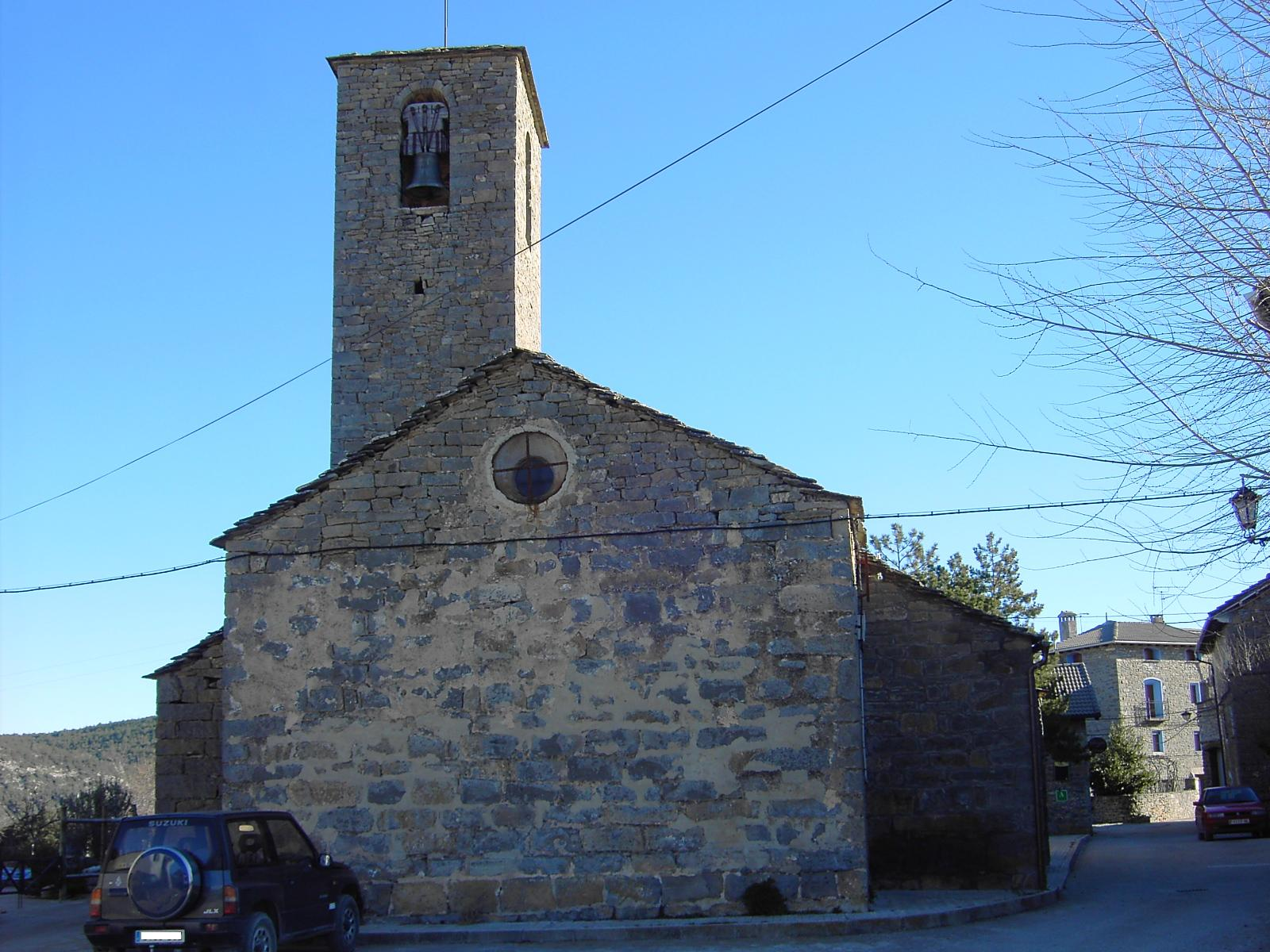 Iglesia de Arcusa, núcleo actualmente perteneciente a l'Aínsa-Sobrarbe, pero que fue hasta no hace muchos años el centro del municipio de Alto Sobrarbe antes de su absorción al municipio ainsetano.